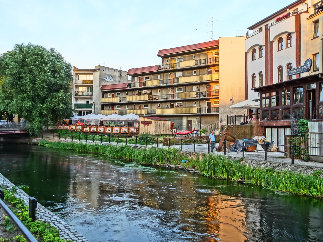 Wenecja Bydgoska – zespół architektoniczny Starego Miasta w Bydgoszczy zbudowany bezpośrednio nad rzeką Młynówką (1870-1900).